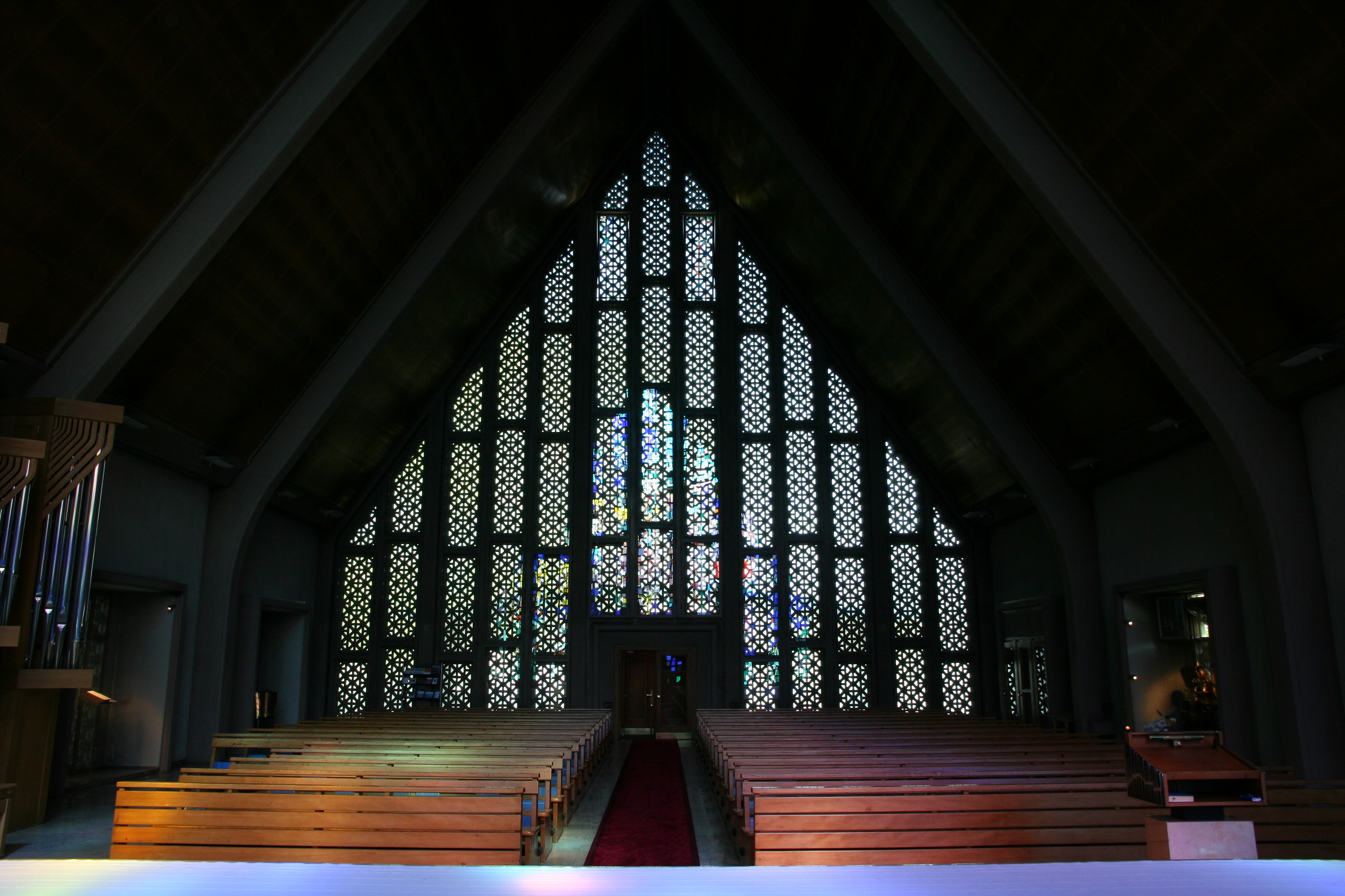 Römisch-katholische Pfarrkirche St. Marien Herrliberg